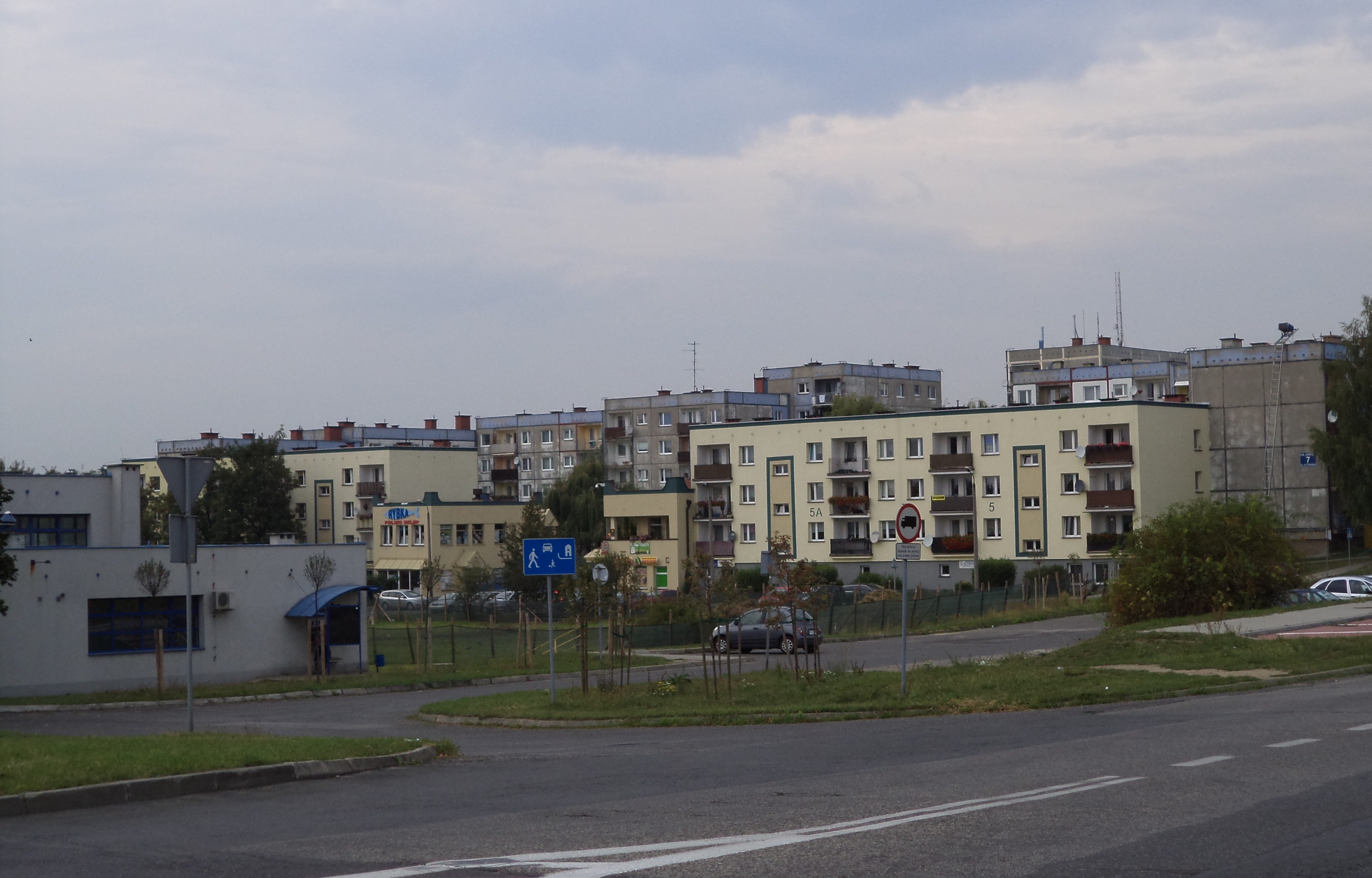 Bloki osiedla "Przyjaźń" w Tarnowskich Górach